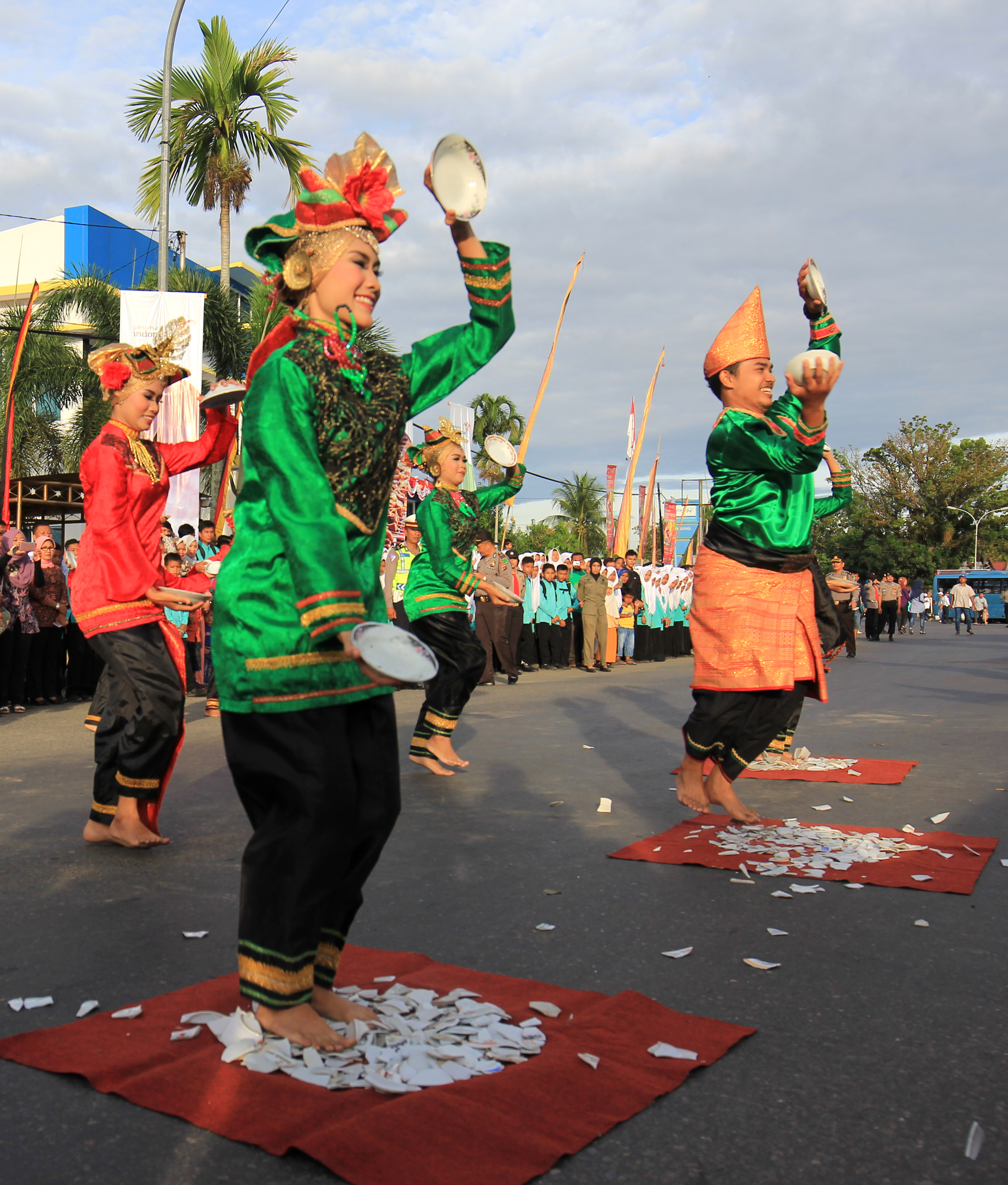 Tari piring dengan menginjak pecahan kaca piring pada acara budaya di Kabupaten Sijunjung, Sumatera Barat. Tari Piring atau Tari Piriang adalah tari khas suku Minangkabau dengan melakukan gerakan tari sambil kedua tangan menggenggam piring. Seringkali puncak pertunjukan tari piring dilakukan dengan menginjak-injak pecahan kaca tanpa melukai kaki penarinya.